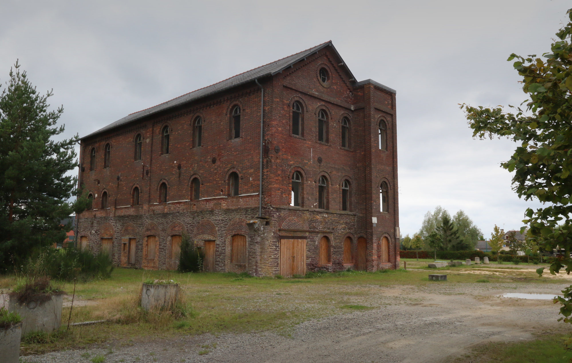 Bâtiment désaffecté des bureaux de l'ancienne mine du plomb.